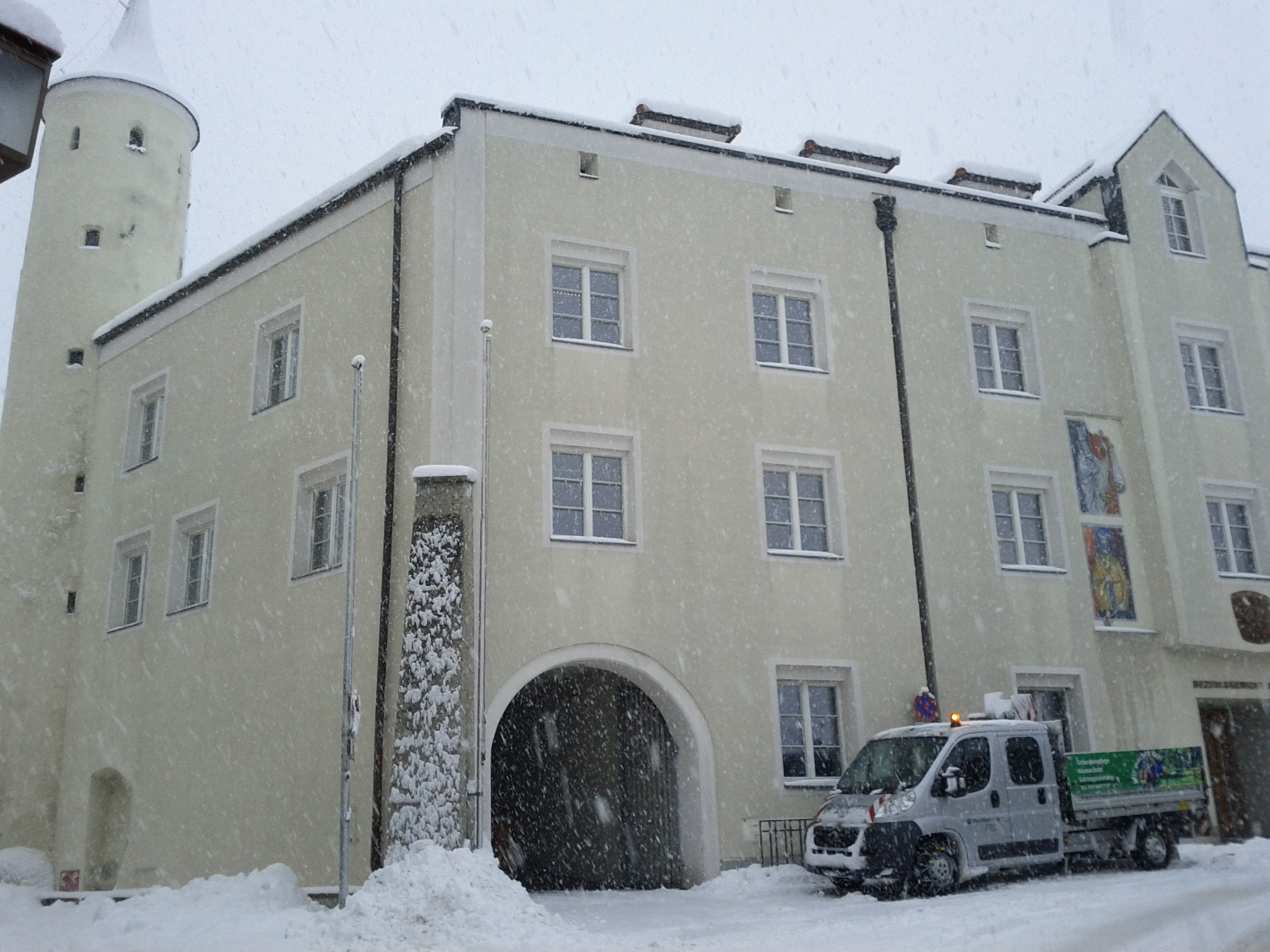 Bezirksgericht Schwaz, Ludwig-Penz-Straße 13